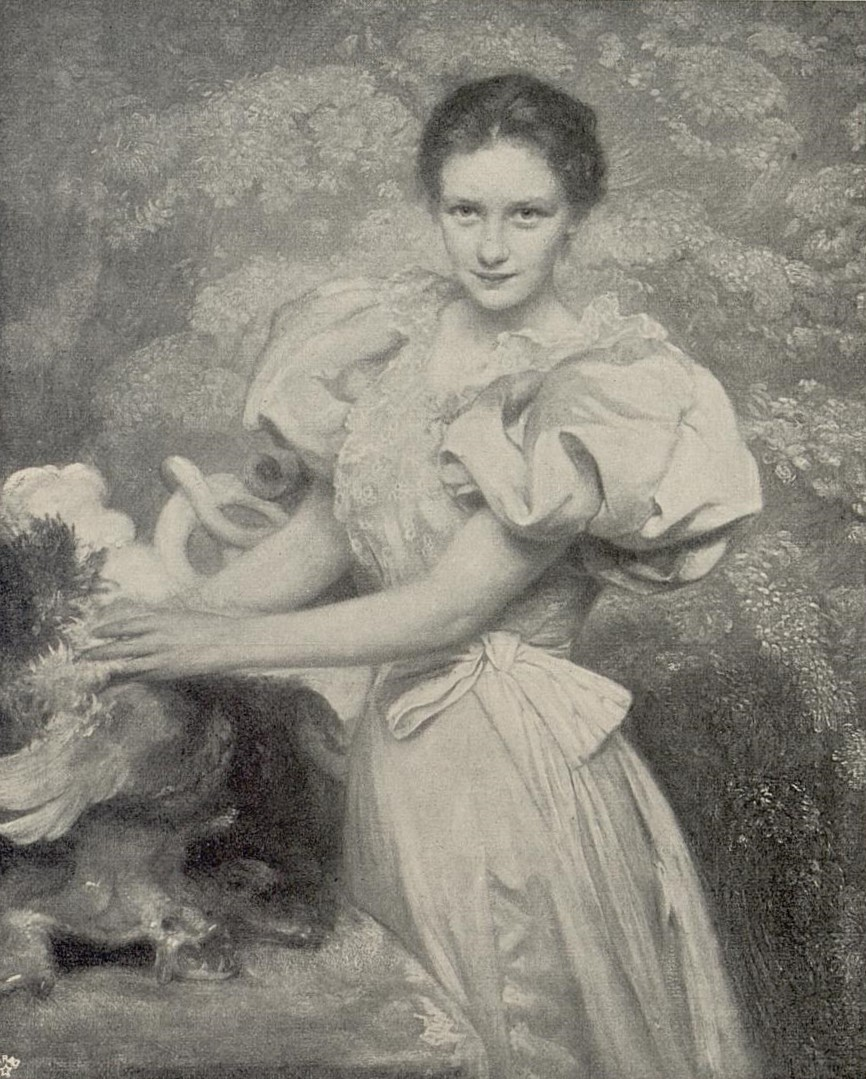 Max Koner: Fräulein Marie Siemens (Frau Dr. Wiegand), 1896